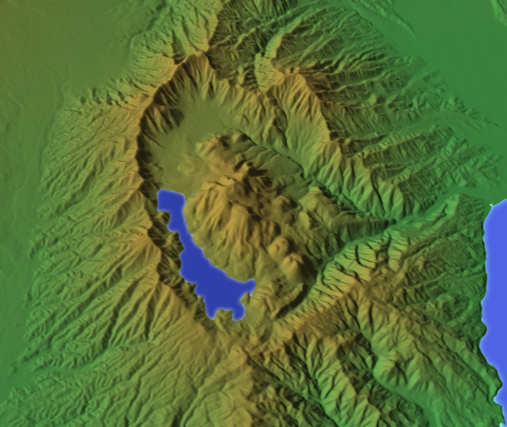 箱根山地のCG画像。カシミール3Dを使用し作成。編集。